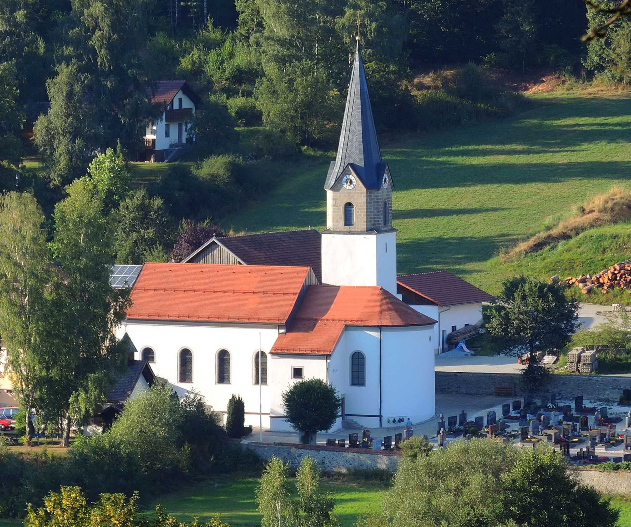 Katholische Pfarrkirche St. Jakobus in Achslach - Aussenansicht aus südostlicher Richtung